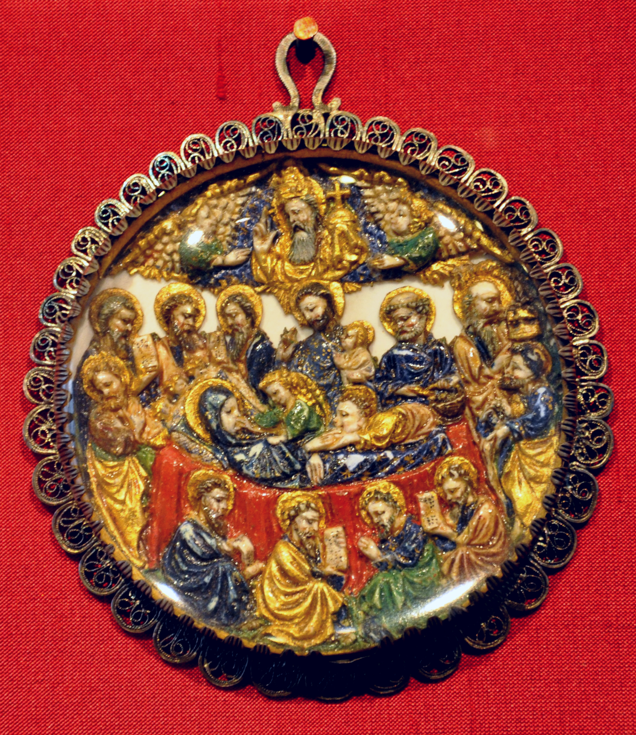 Marientod, Fragment aus einer nicht erhaltenen Monstranz (abgebildet im „Hallschen Heiltum“ in Aschaffenburg), franco-flämisch, um 1400 Elfenbeinscheibe, geschnitzt, farbig gefasst; späterer Gold- und Silberrahmen Museum für Angewandte Kunst Frankfurt, Frankfurt am Main, Inv. Nr. 6469 (Arnold Selig, Paris, 1929)